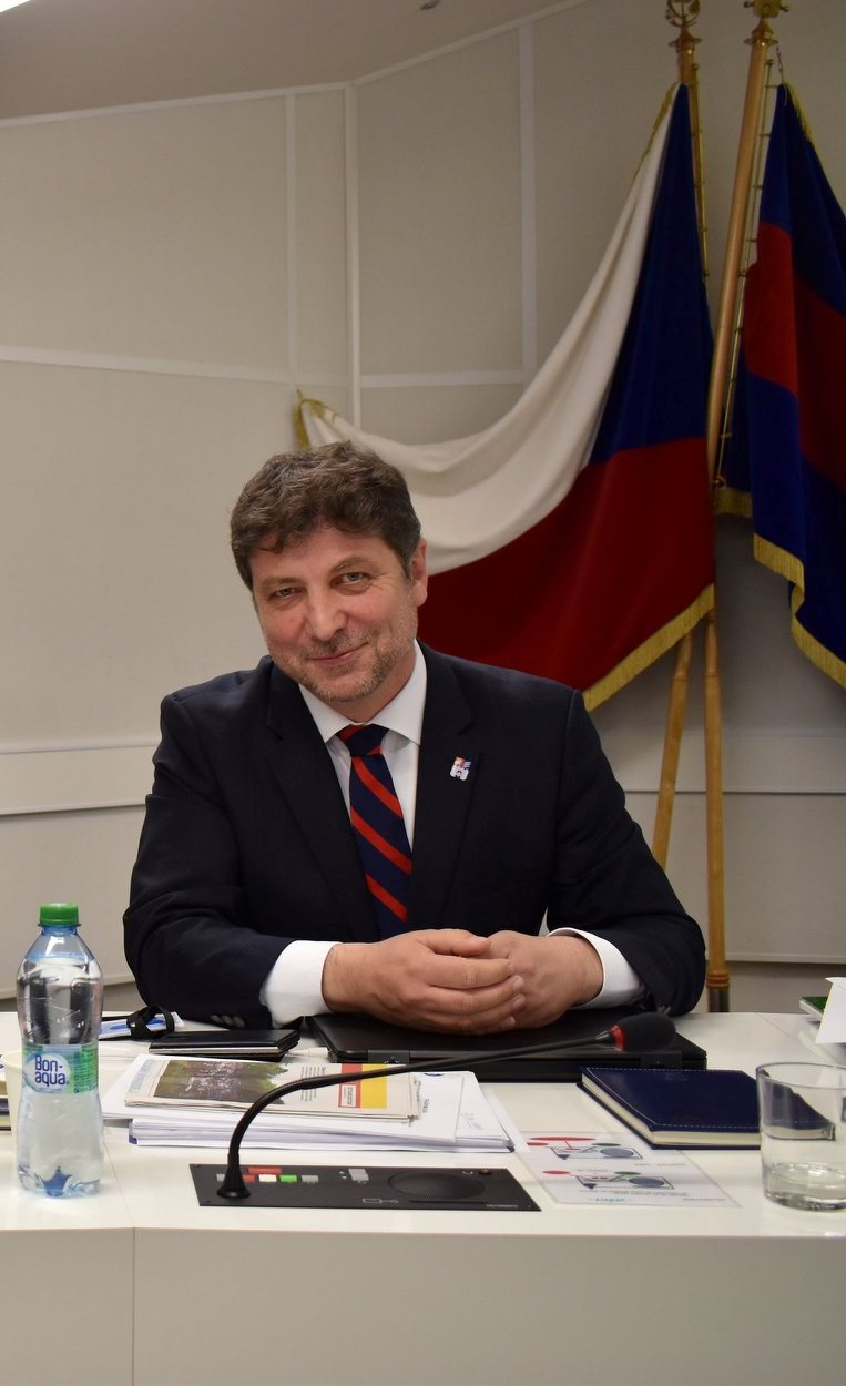 zasedání zastupitelstva Prahy 6